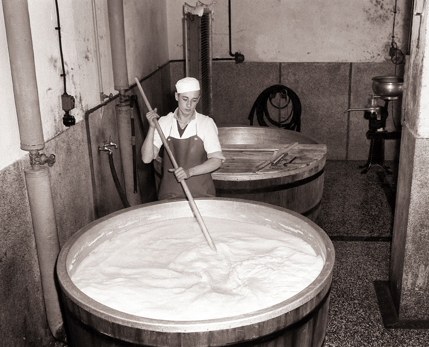 Zadružna mlekarna v Planini pri Sevnici